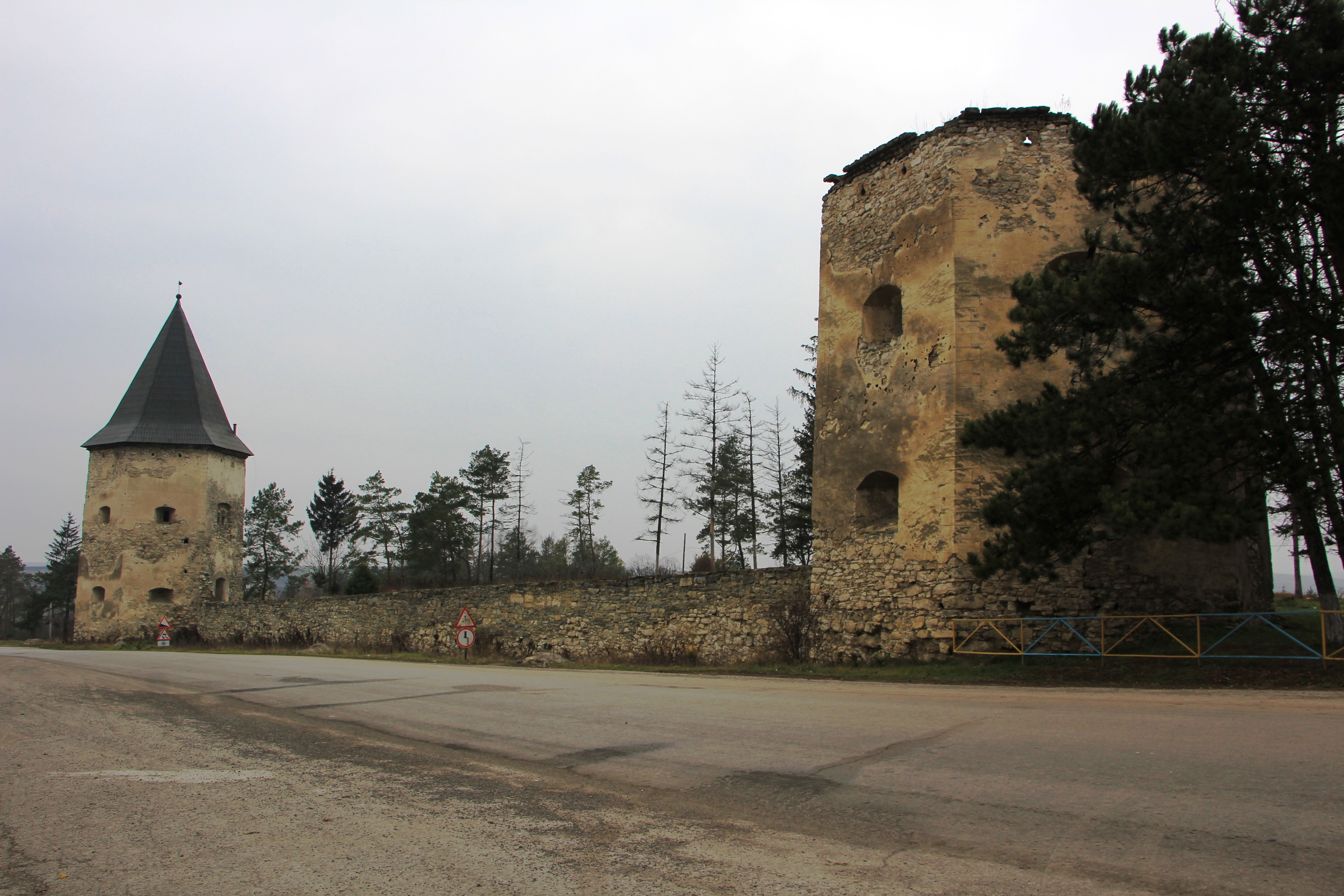 Замок